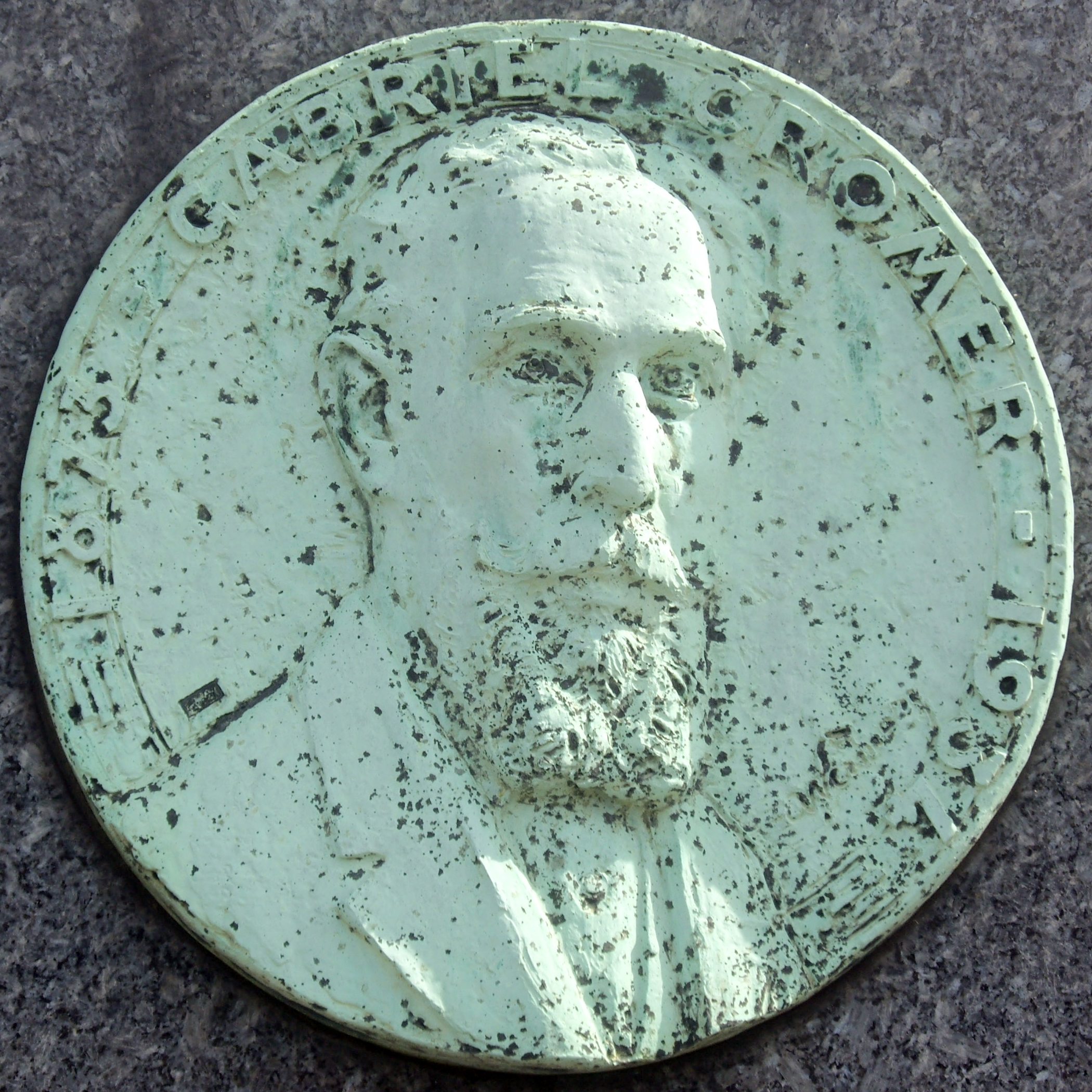 Tombe de Gabriel Cromer, cimetière de Montrouge, division 55. Médaillon.